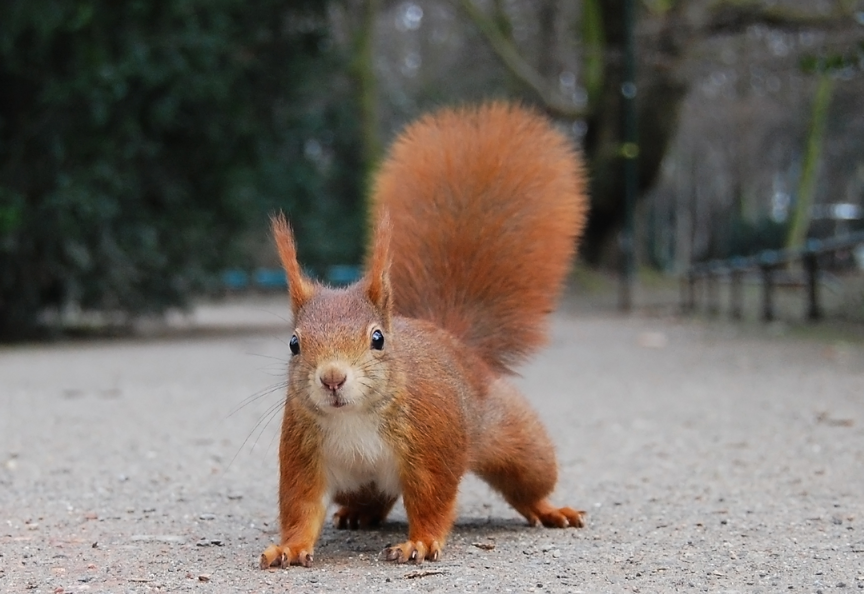 Eichhörnchen (Sciurus vulgaris) mit ausgeprägten winterlichen Ohrpinseln im Düsseldorfer Hofgarten